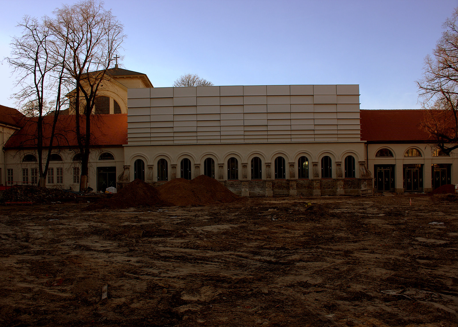 Ehem. Reithalle Schloss Köthen